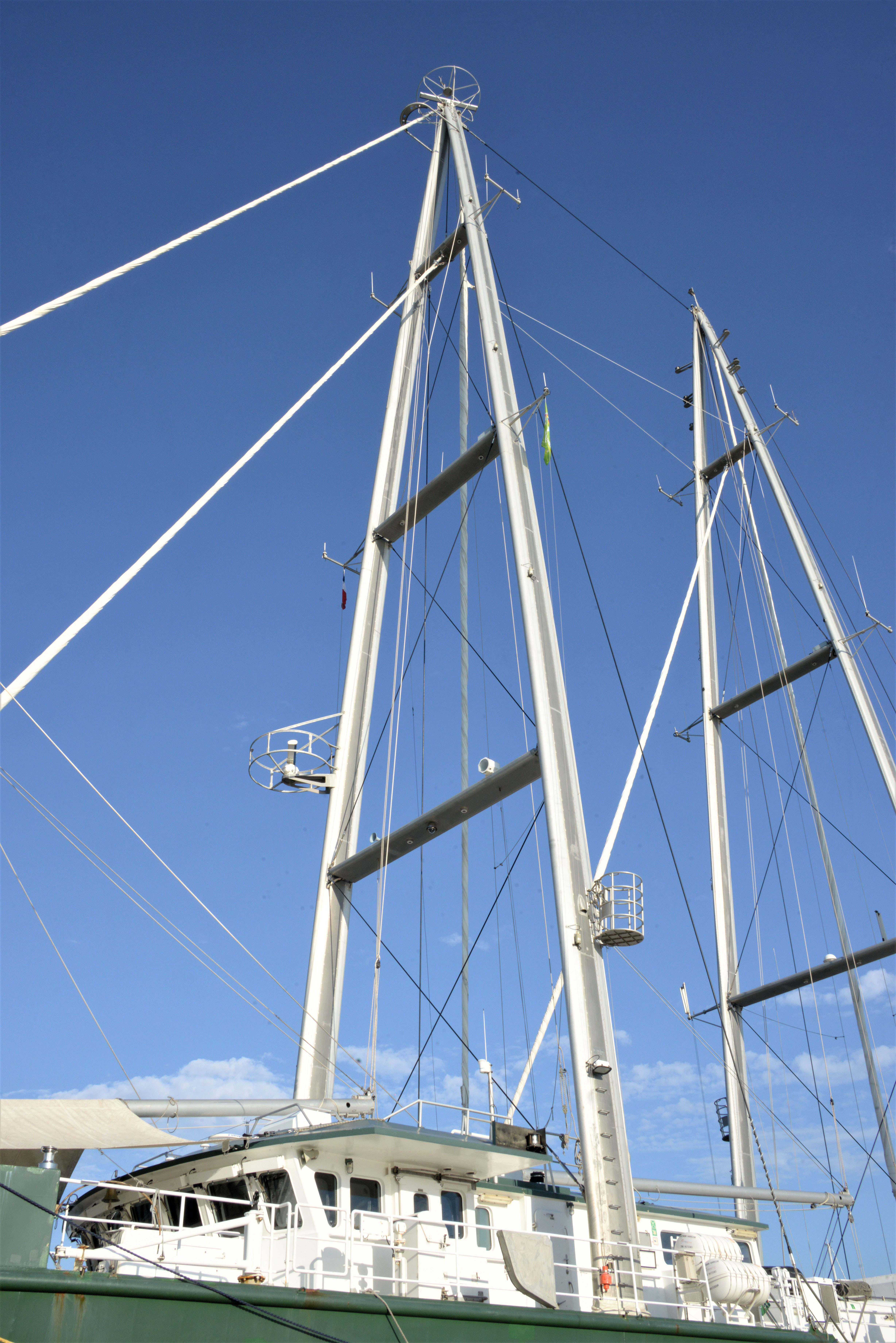 La mâture du « Rainbow Warrior III » est de type « A-frame » (mâts en forme de A). Chacun des deux mâts mesure 55 mètres de haut. Escale du « Rainbow Warrior III » à La Rochelle les 3 et 4 août 2019, Bassin des Chalutiers. La Rochelle, Charente-Maritime, France.